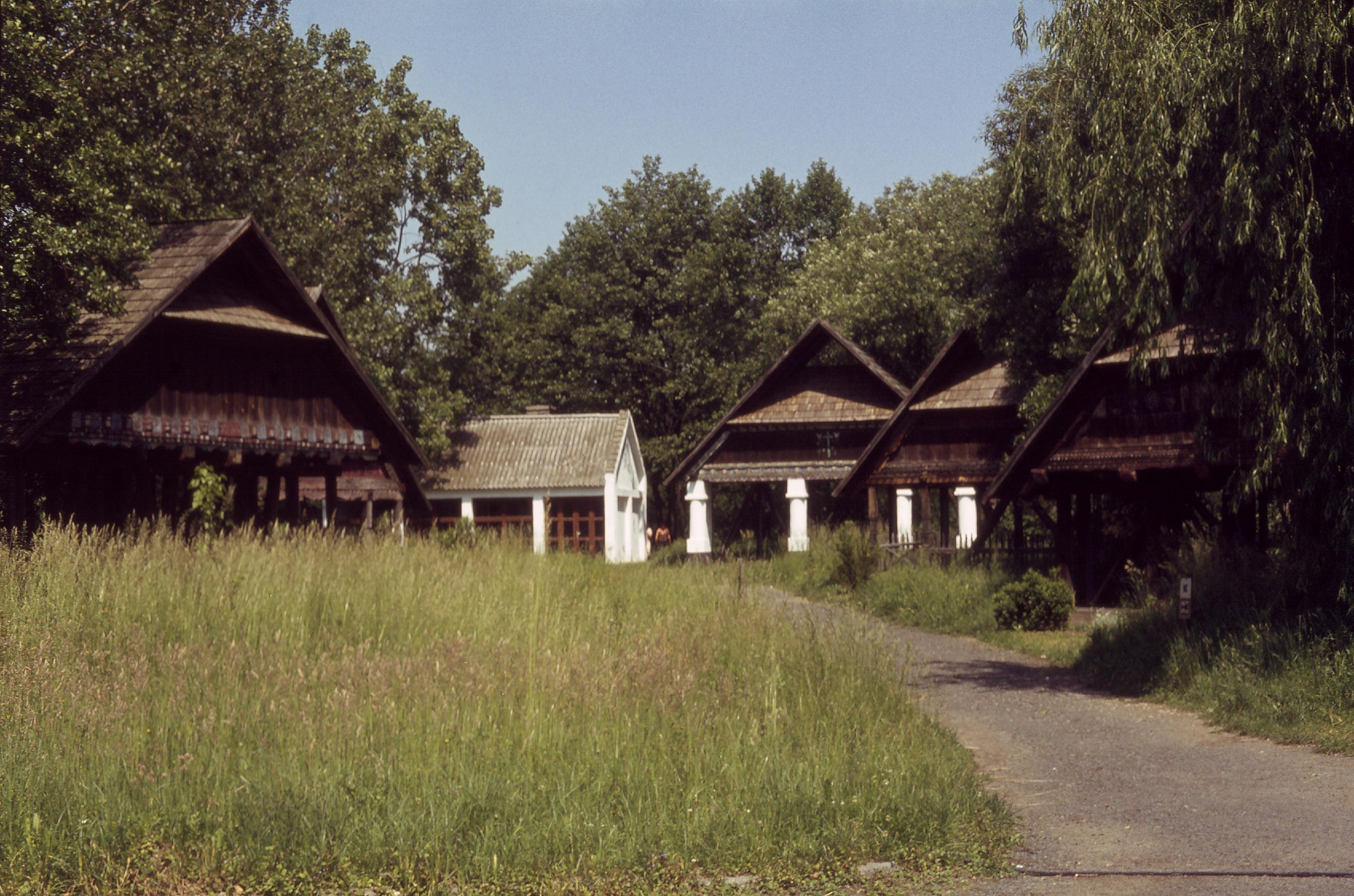 Zalaegerszegi skanzen, épült 1964-ben